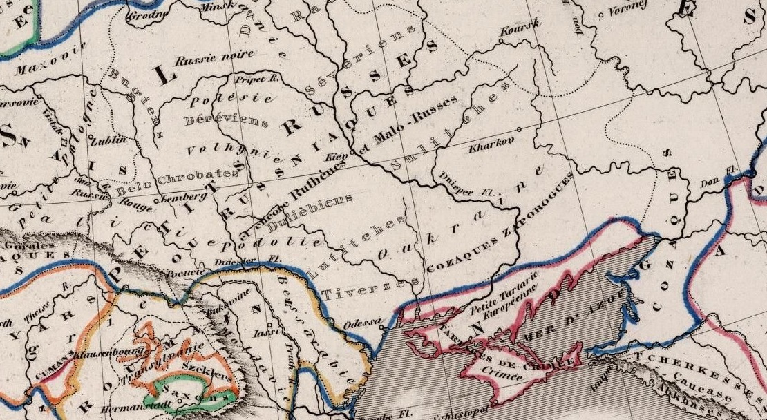 Lokalizacja Białochorwatów